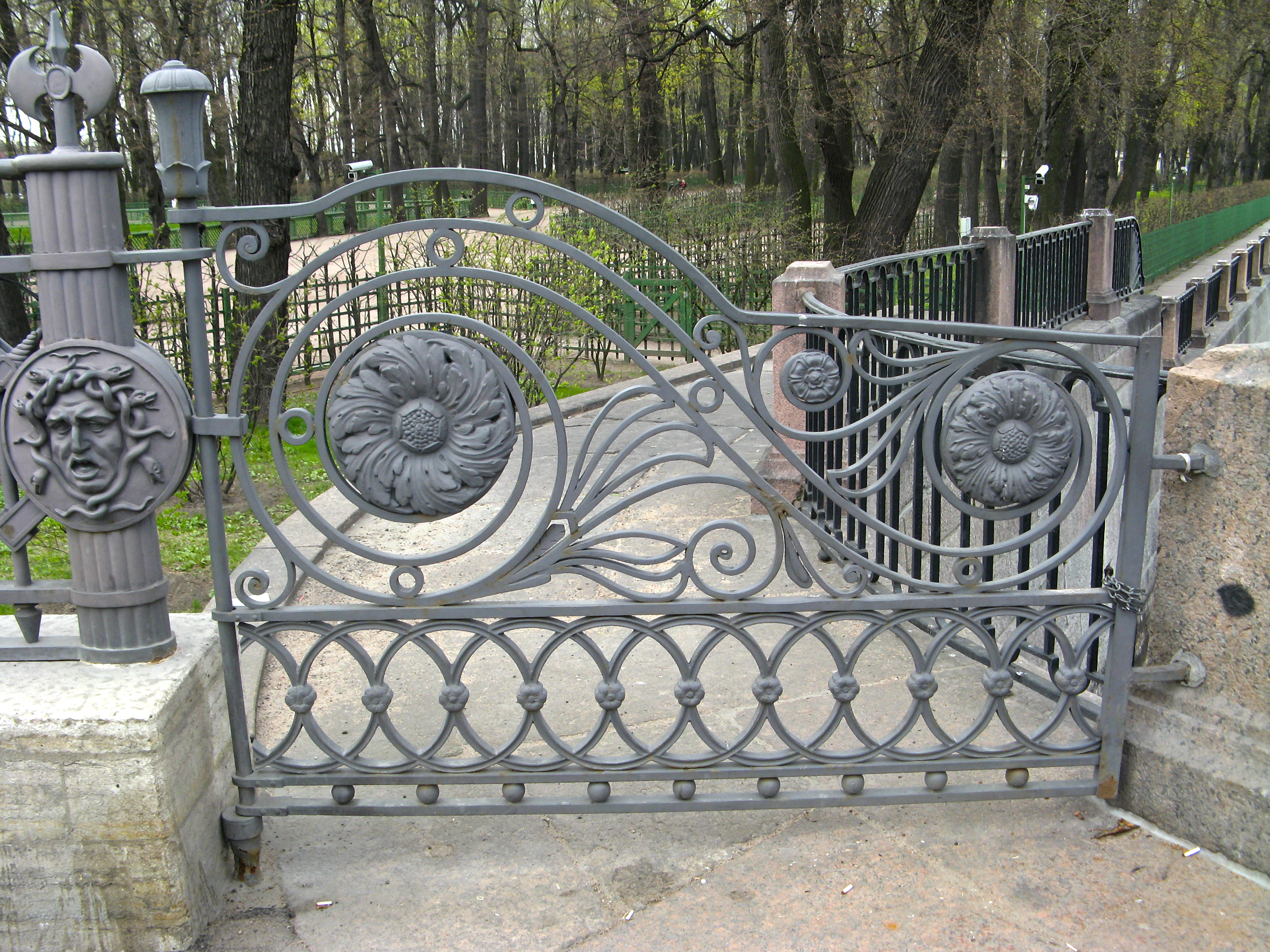 Ограда: Летний сад, набережная р. Мойки, Центральный район, Санкт-Петербург